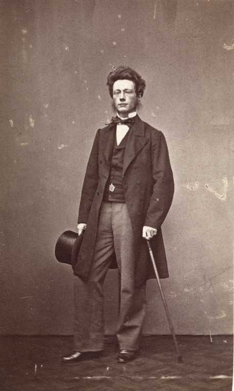 Oluf Falck-Ytter ca. 1860–1870